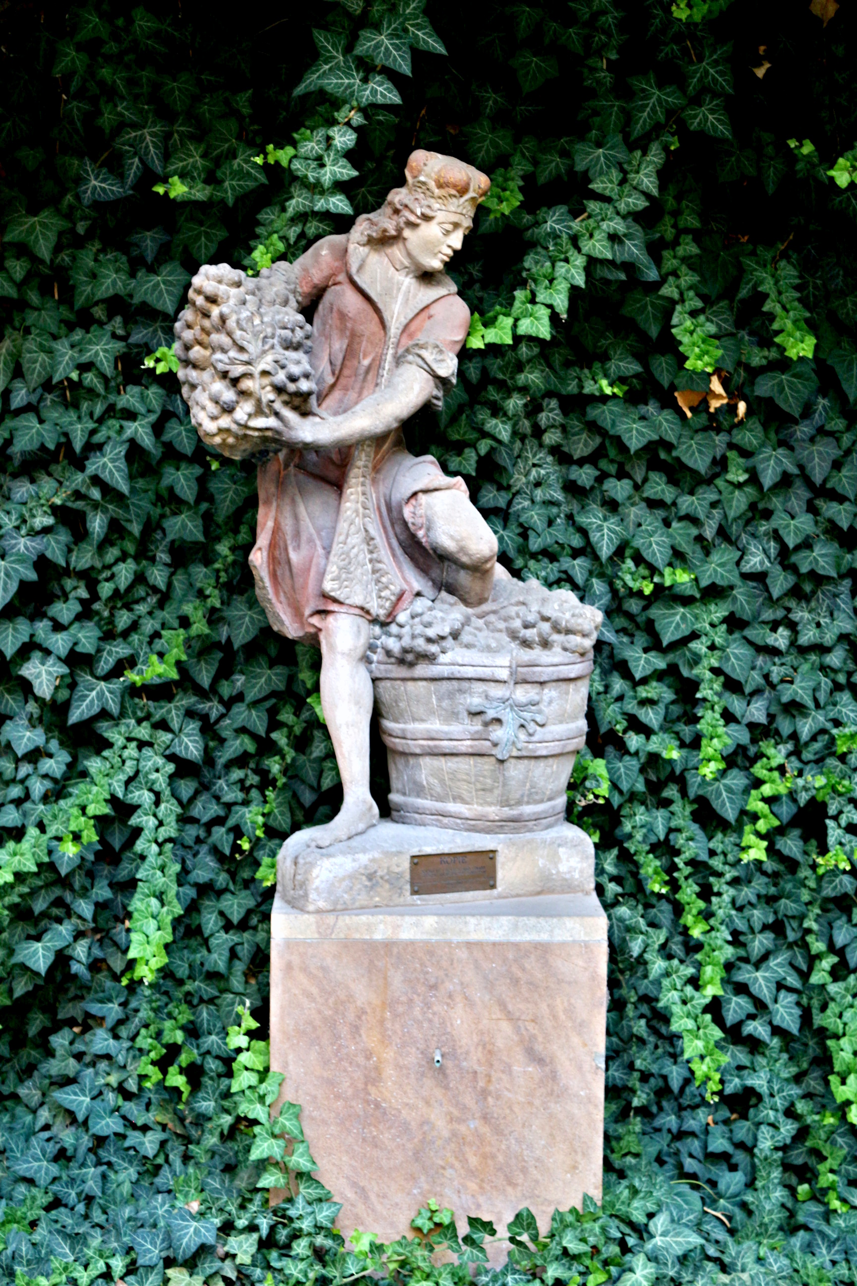 Jezuitský konvikt, Praha-Staré Město